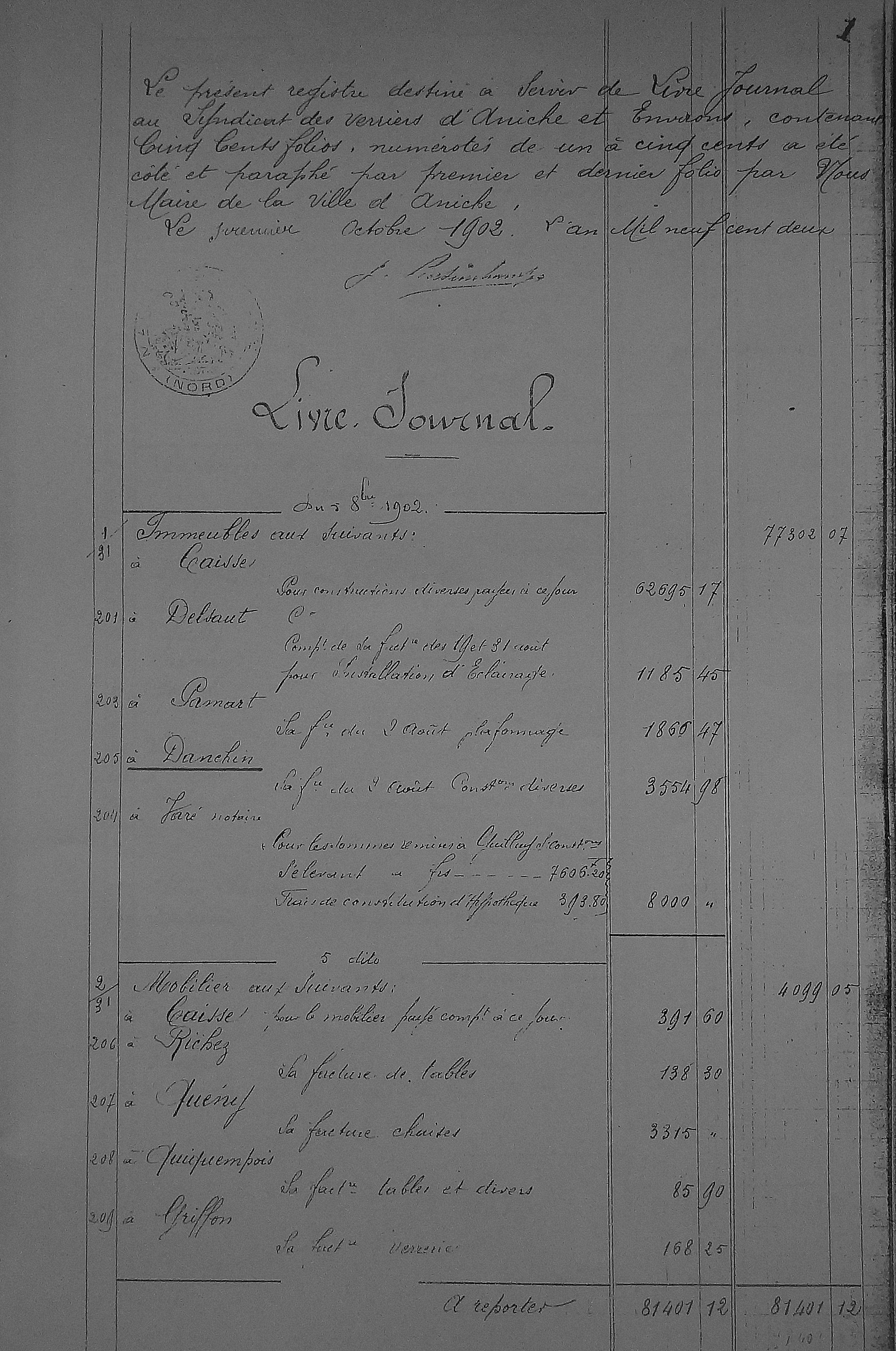 Syndicat des verriers d'Aniche et environs - Livre Journal paraphé du Maire M.Bertinchamps 1-10-1902 précisant toutes les recettes et dépenses du syndicat y compris bals; séances de cinéma etc..